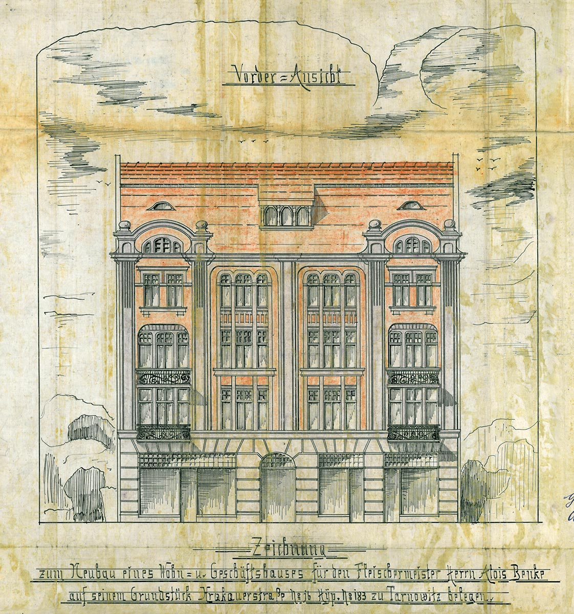 Projekt kamienicy przy ulicy Krakowskiej 16 w Tarnowskich Górach z dnia 25 stycznia 1906 r. autorstwa Heinricha Pisczka; rysunek tuszem, Archiwum Urzędu Miejskiego w Tarnowskich Górach, teczka A 437